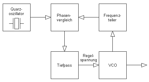 Blockschaltbild einer PLL